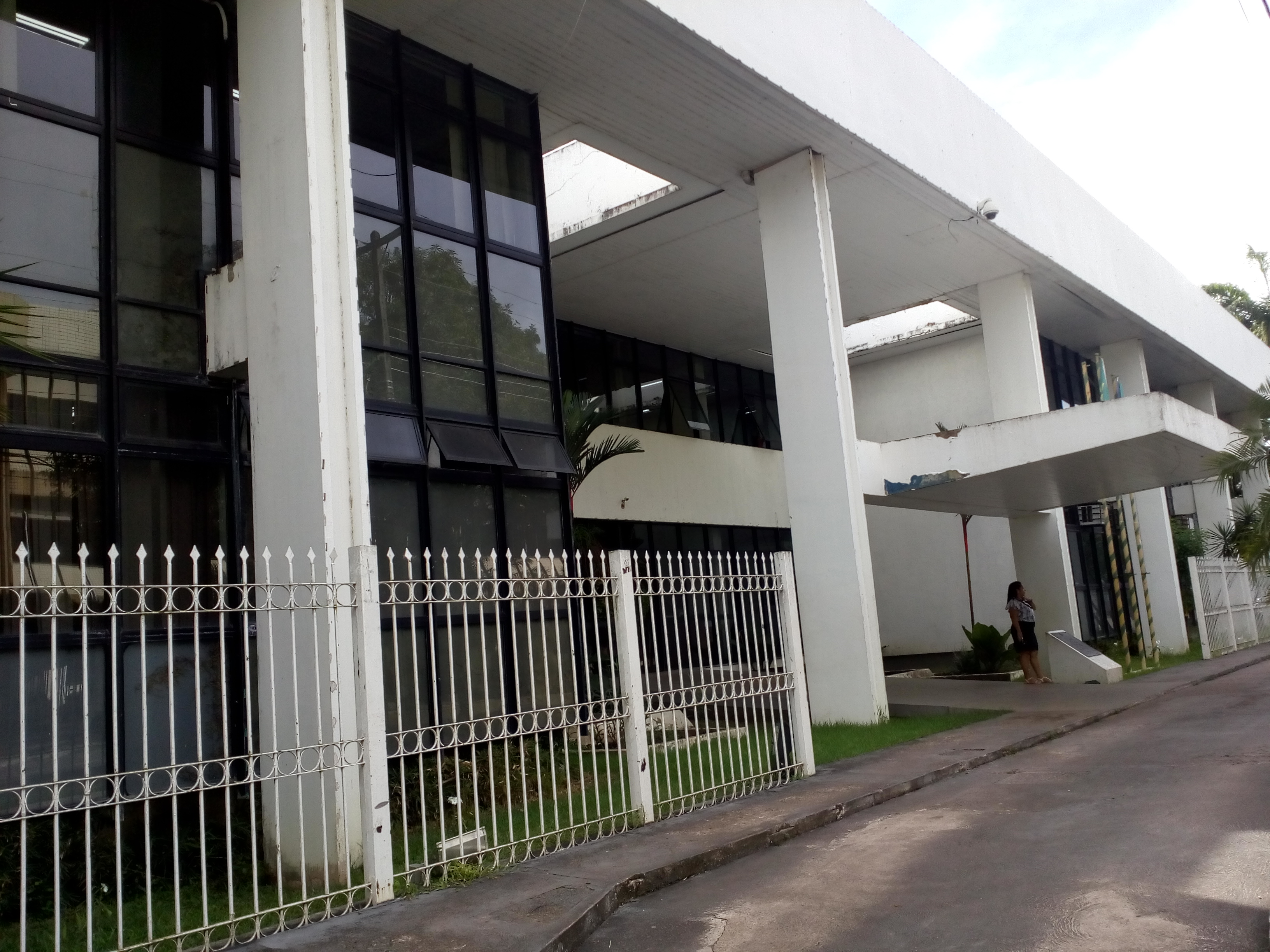 Palácio do Setentrião, sede do poder Executivo no Amapá, 2018.